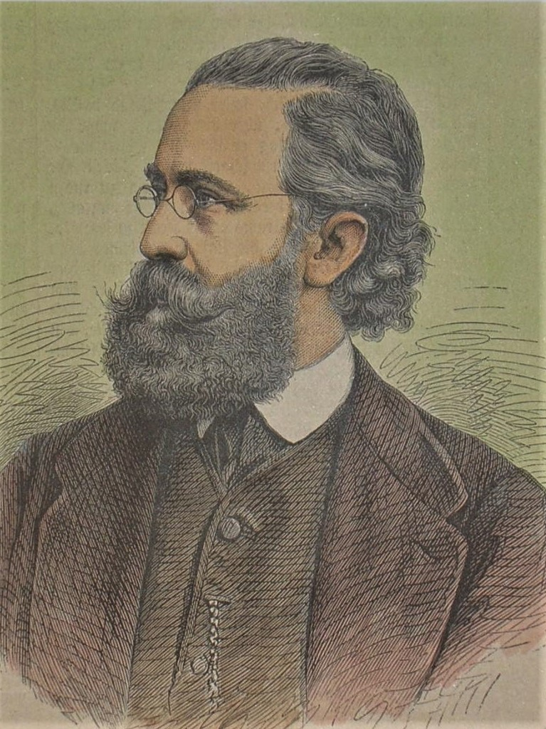 Karl Friedrich Arnold von Lützow, teilkolorierter Holzstich